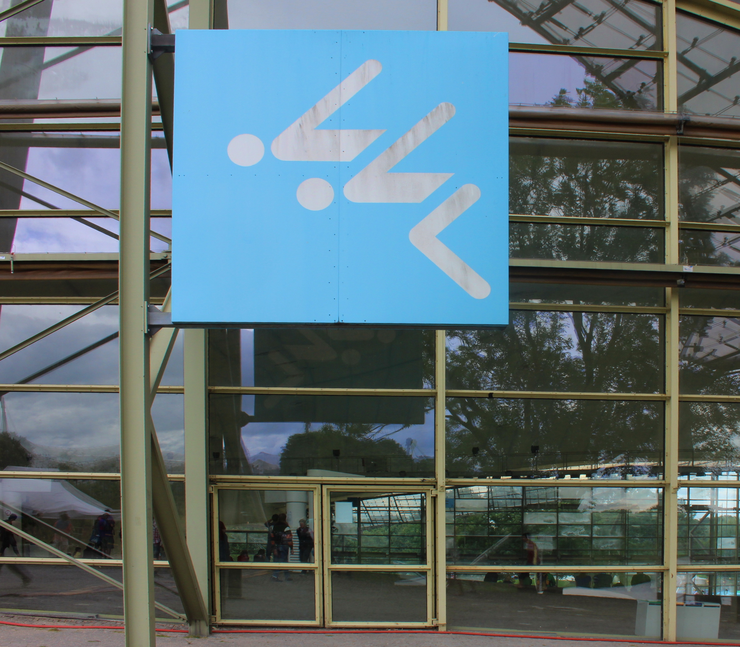 Piktogramm an der Münchner Olympiaschwimmhalle